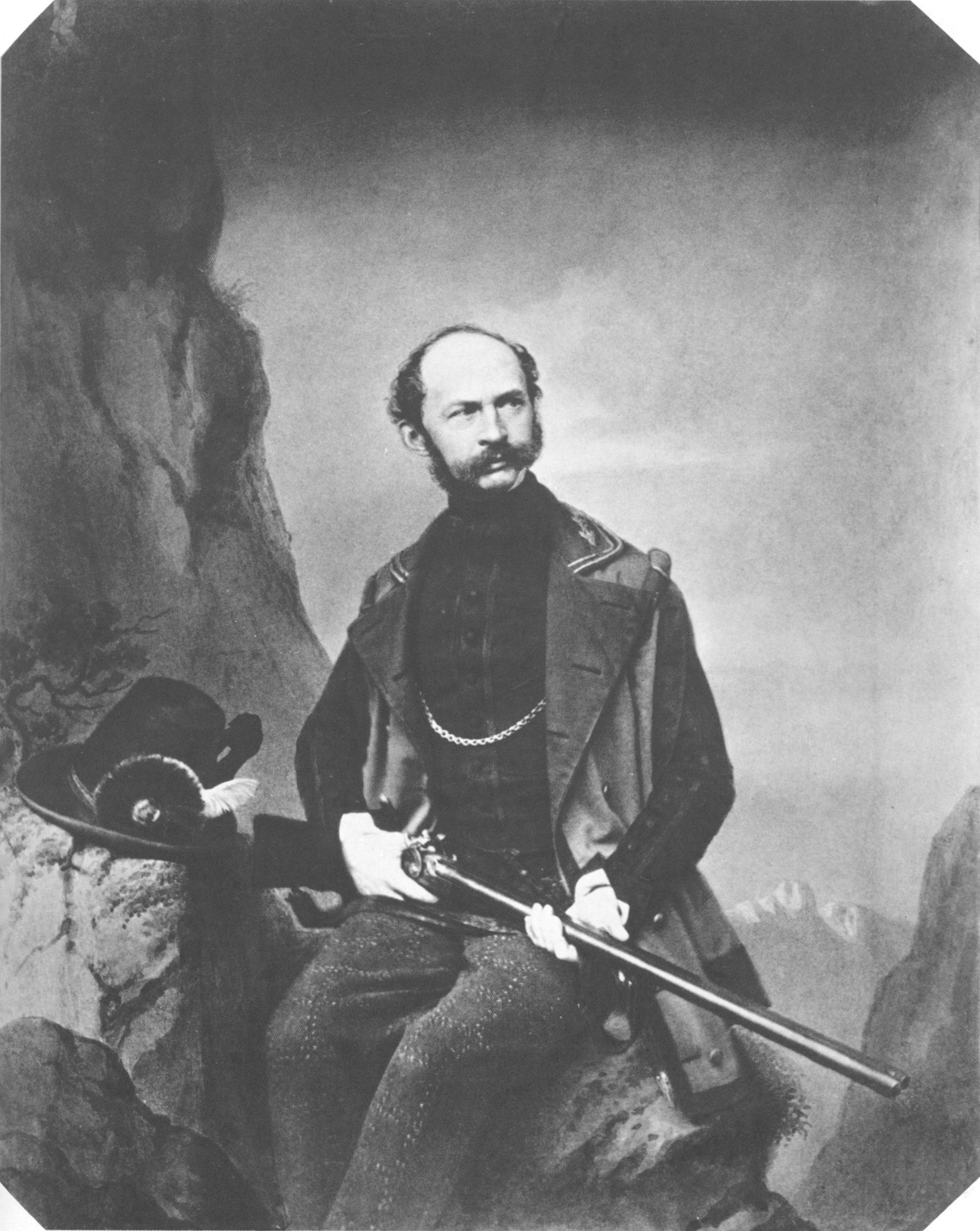 Max II., König von Bayern (1811-1864), Hintergrund mit Aquarellfaben übermalt